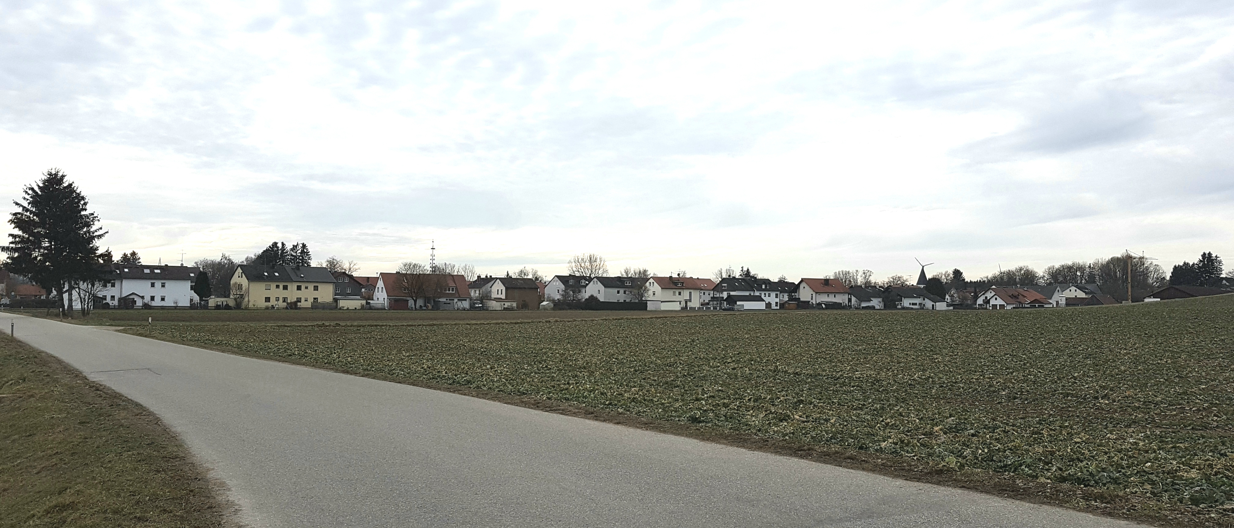 Germerswang, Ansicht von Nordosten.